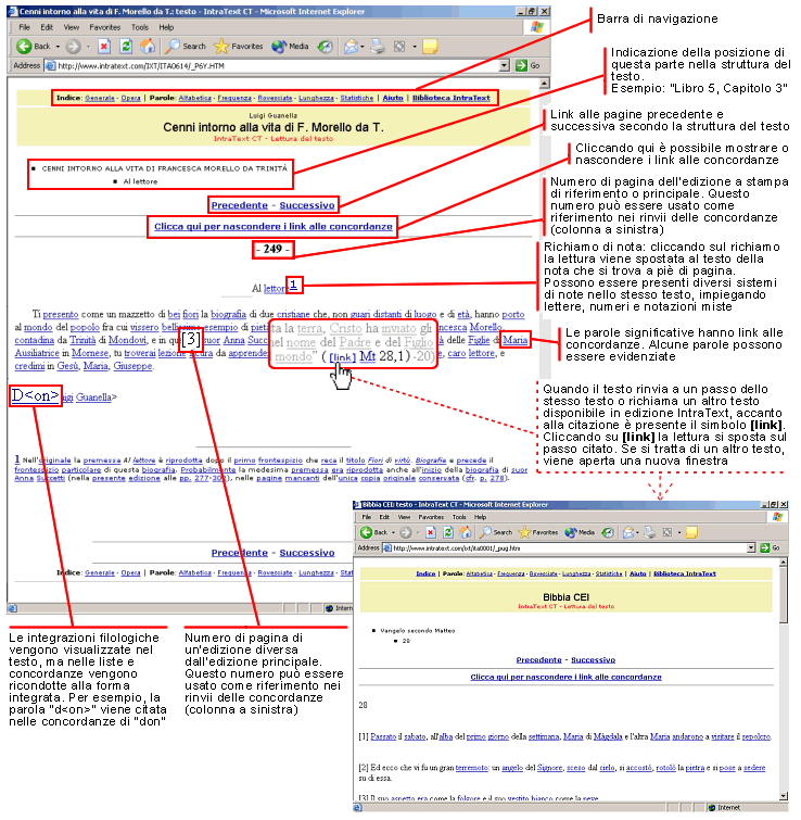 Pagine di Testo IntraText: esempio delle pagine di testo del formato IntraText